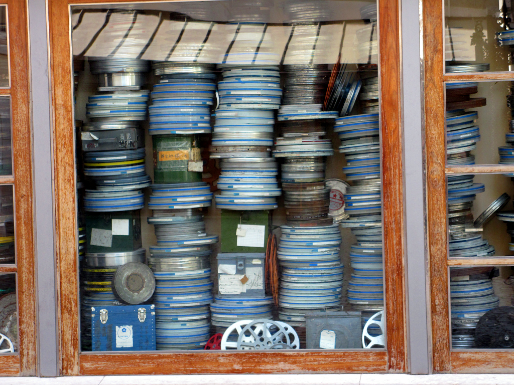 Bobines de Filme na Cinemateca Portuguesa.